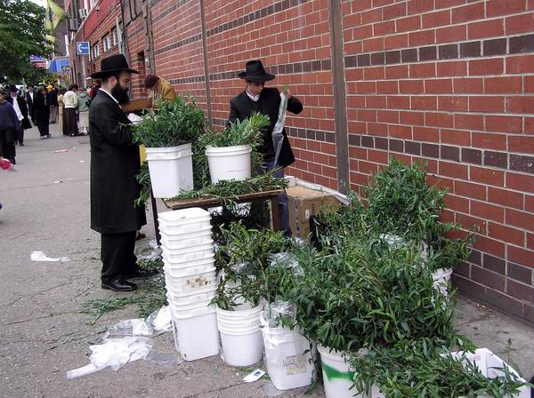 מכירת ערבות למנהג חביטת ערבה בהושענה רבה. מקום צילום: ליד 770 איסטרן פרקווי, ברוקלין ניו יורק - בית מדרשו של הרבי מליובאוויטש